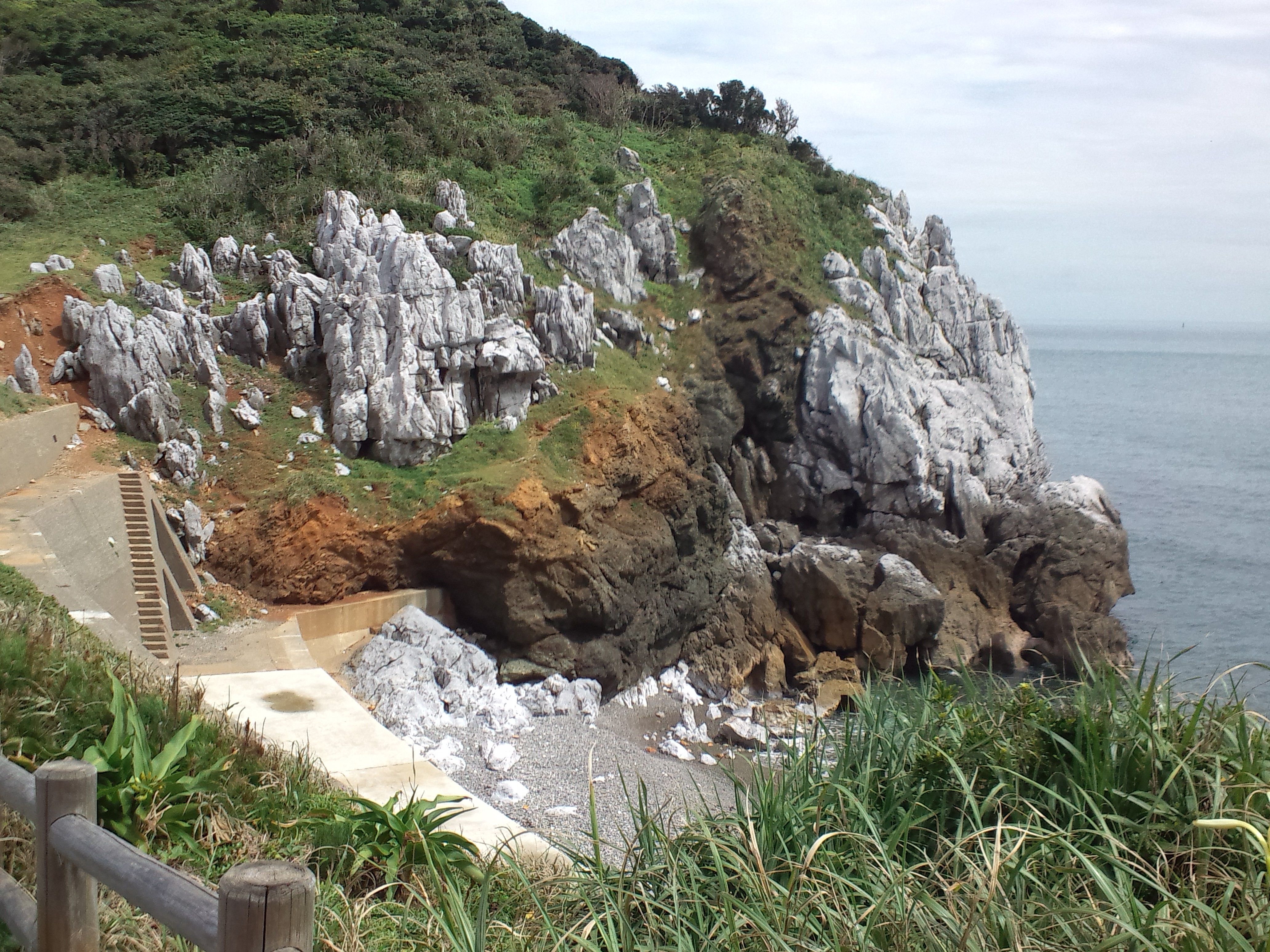 神島（三重県） カルスト地形